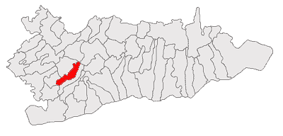 Categorie:Hărţi ale judeţului Călăraşi